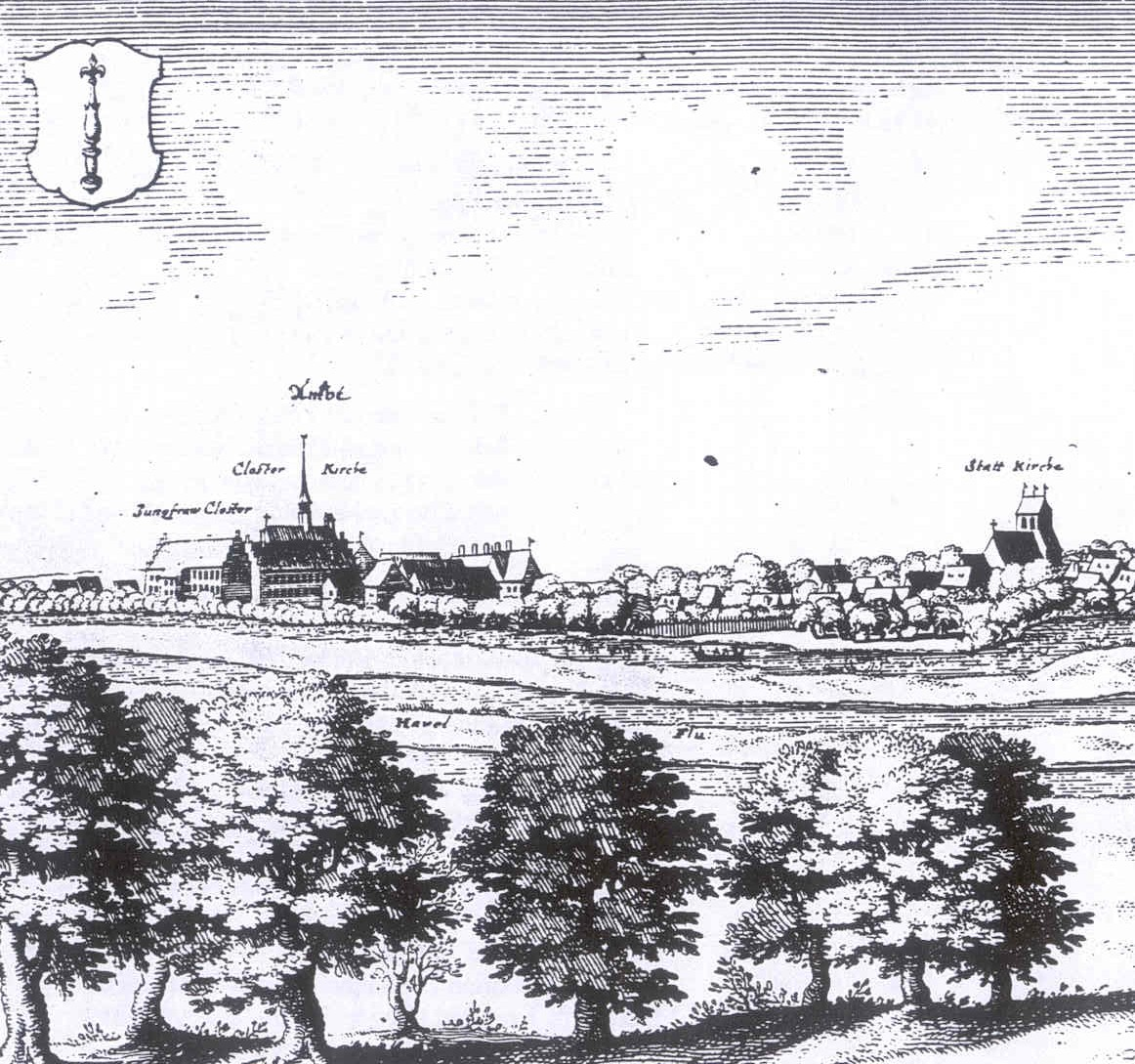 Stadtansicht Zehdenick, Kupferstich